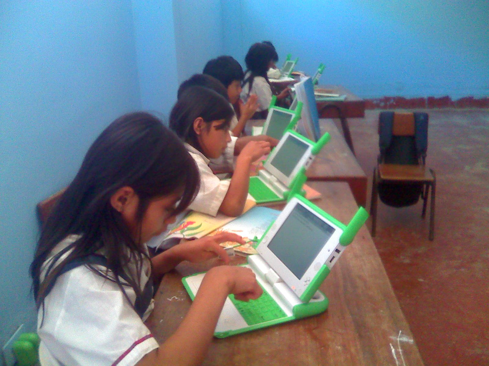 OLPC Peru: Ferreñafe